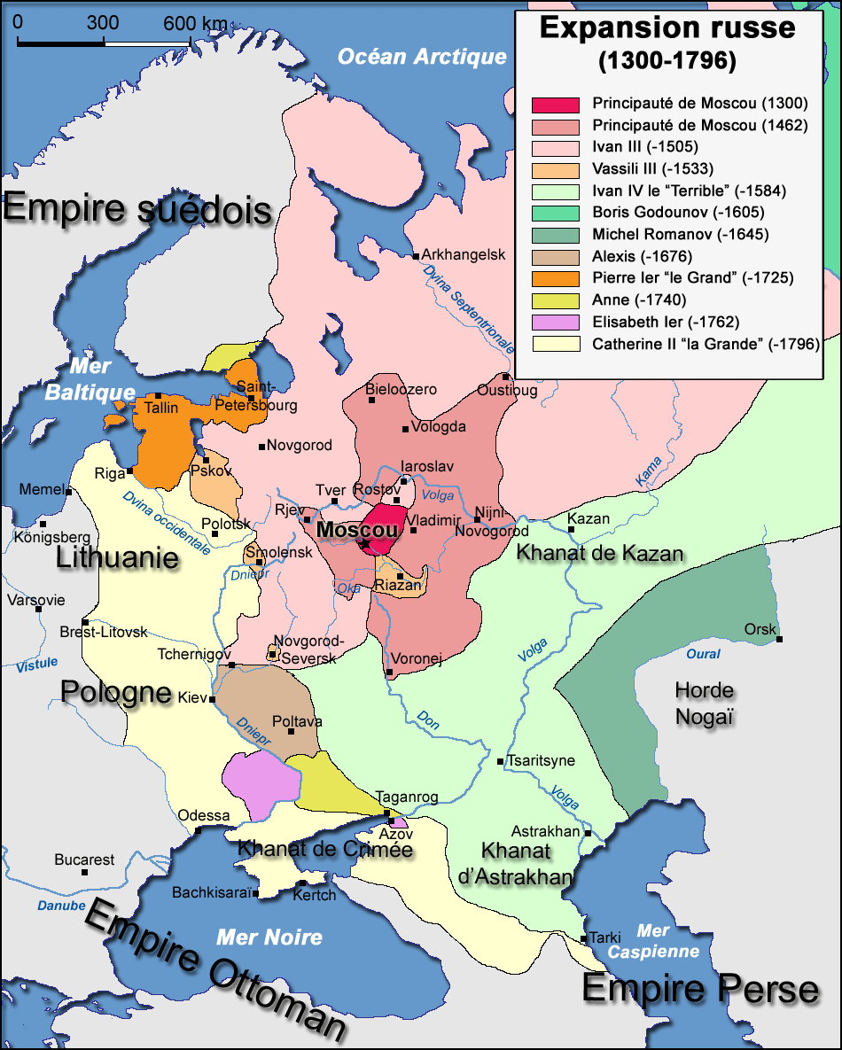 Carte de l'expansion de la Russie entre 1300 et 1796. Cette carte est inspirée de la carte chargée sur Commons Muscovy-Russia 1300-1796.jpg